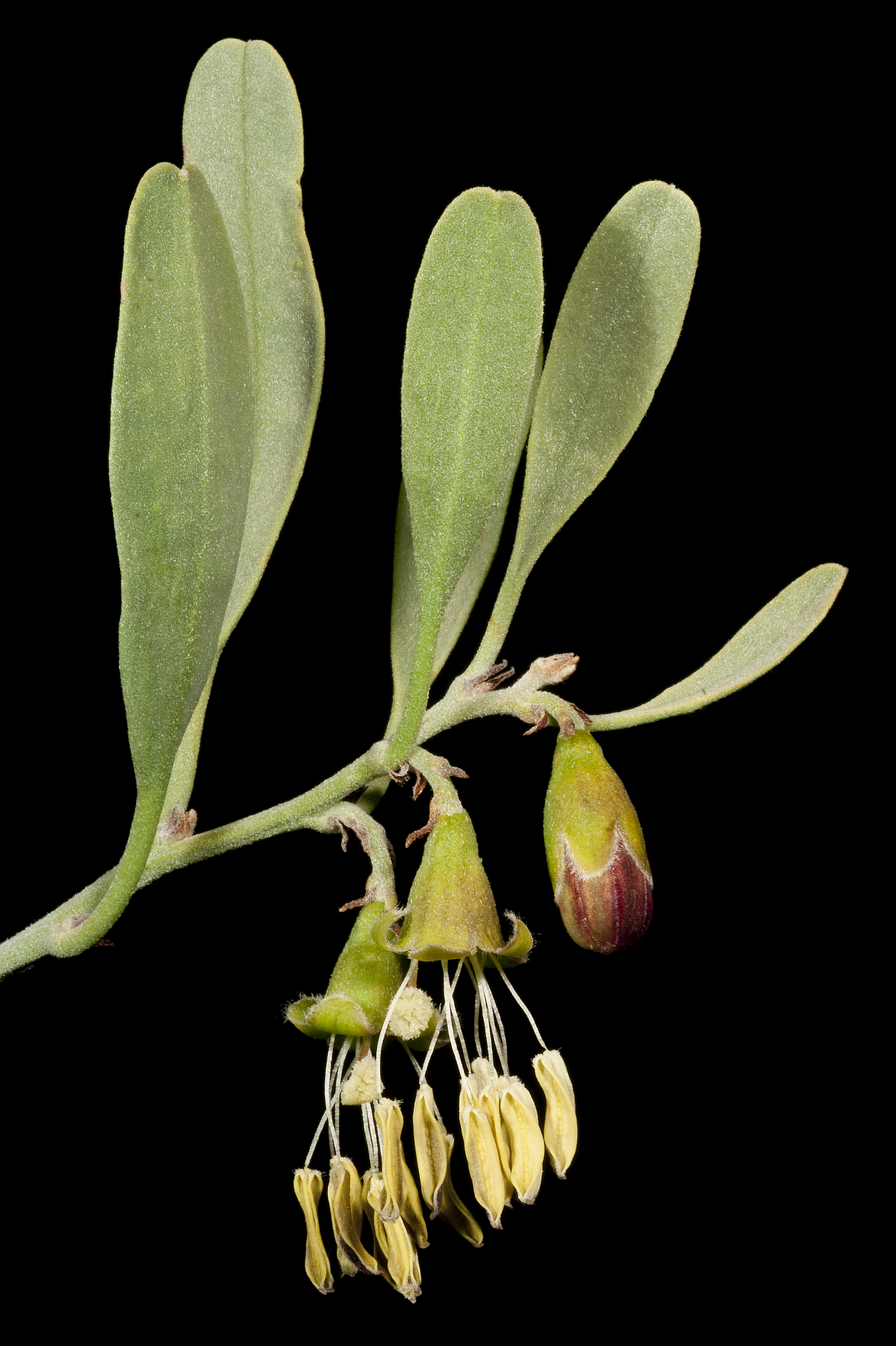 KRT4557